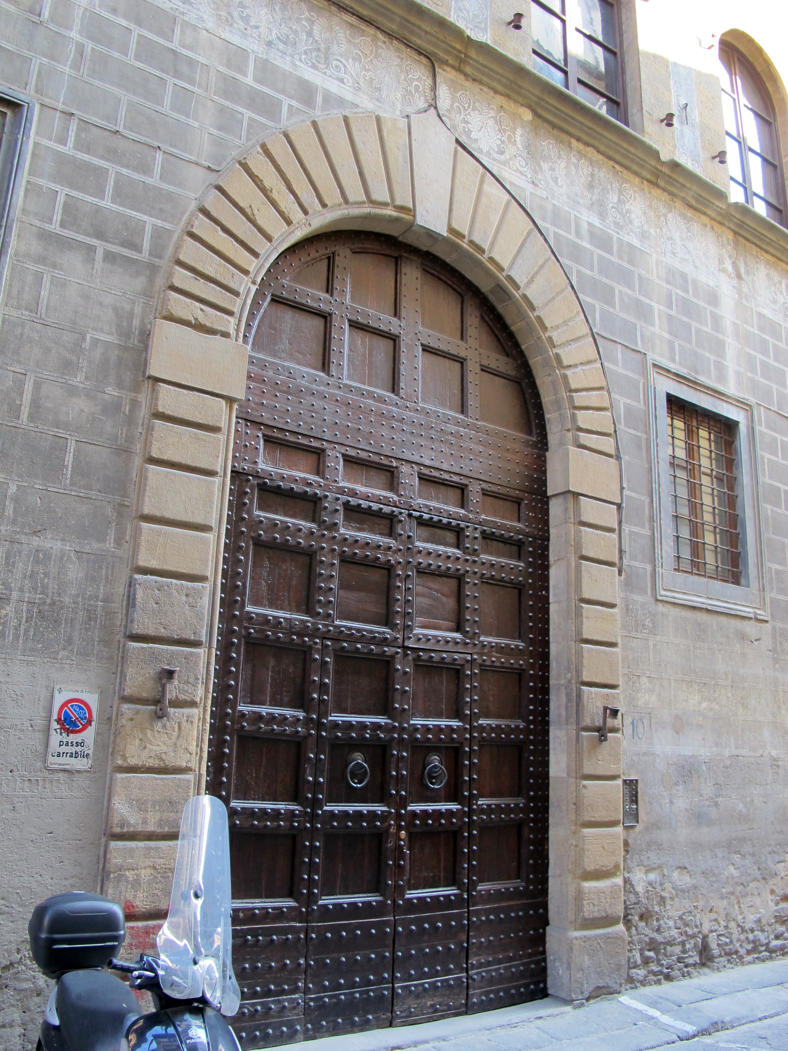 Palazzo Spinelli, portale